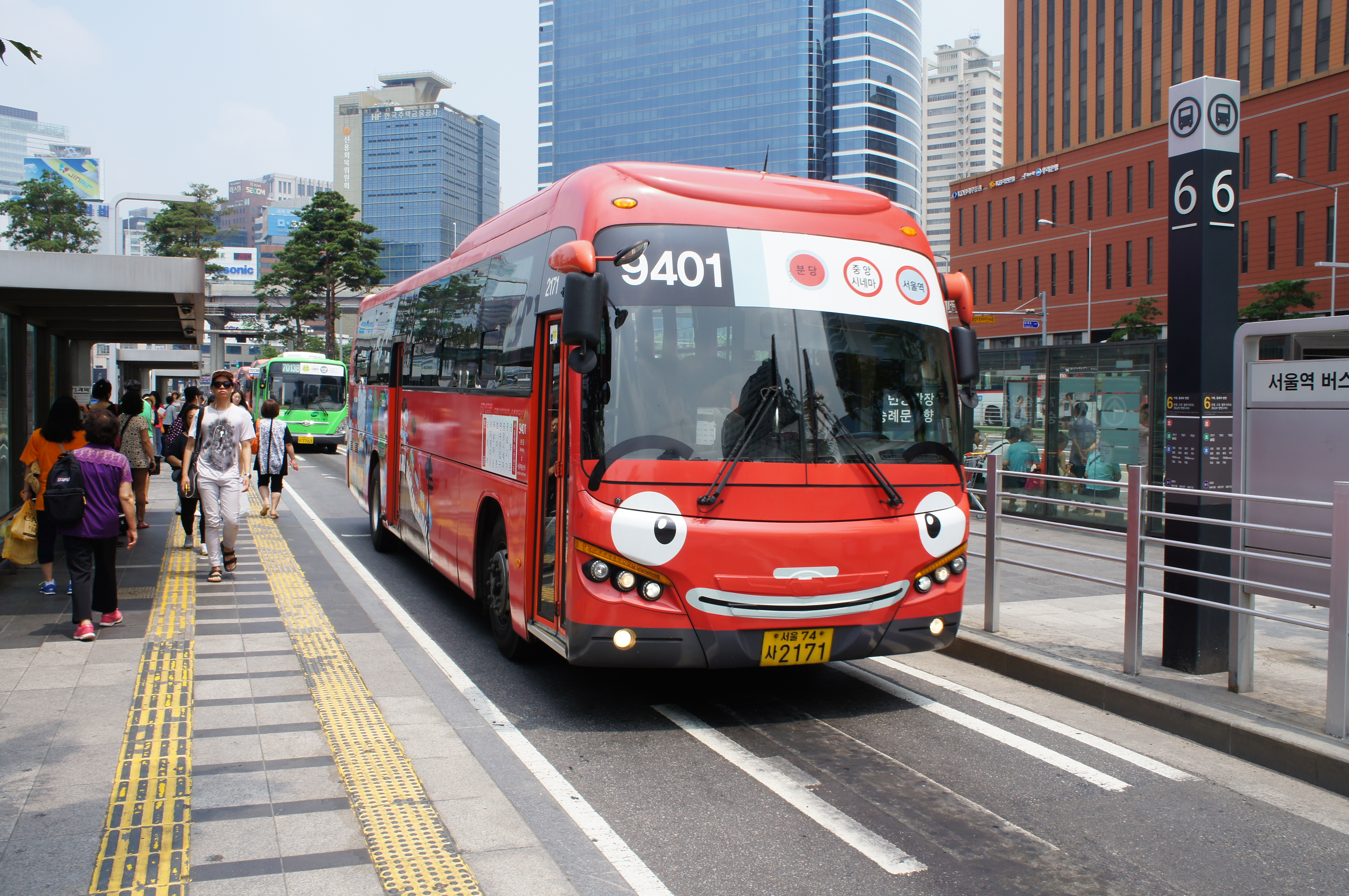 타요버스 가니 9401번 FX116 CNG 2171호